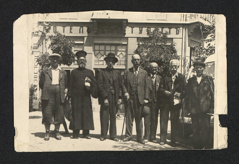 Милан Матов, Анастас Лозанчев и стари другари в освободения Охрид, лятото на 1943 година.